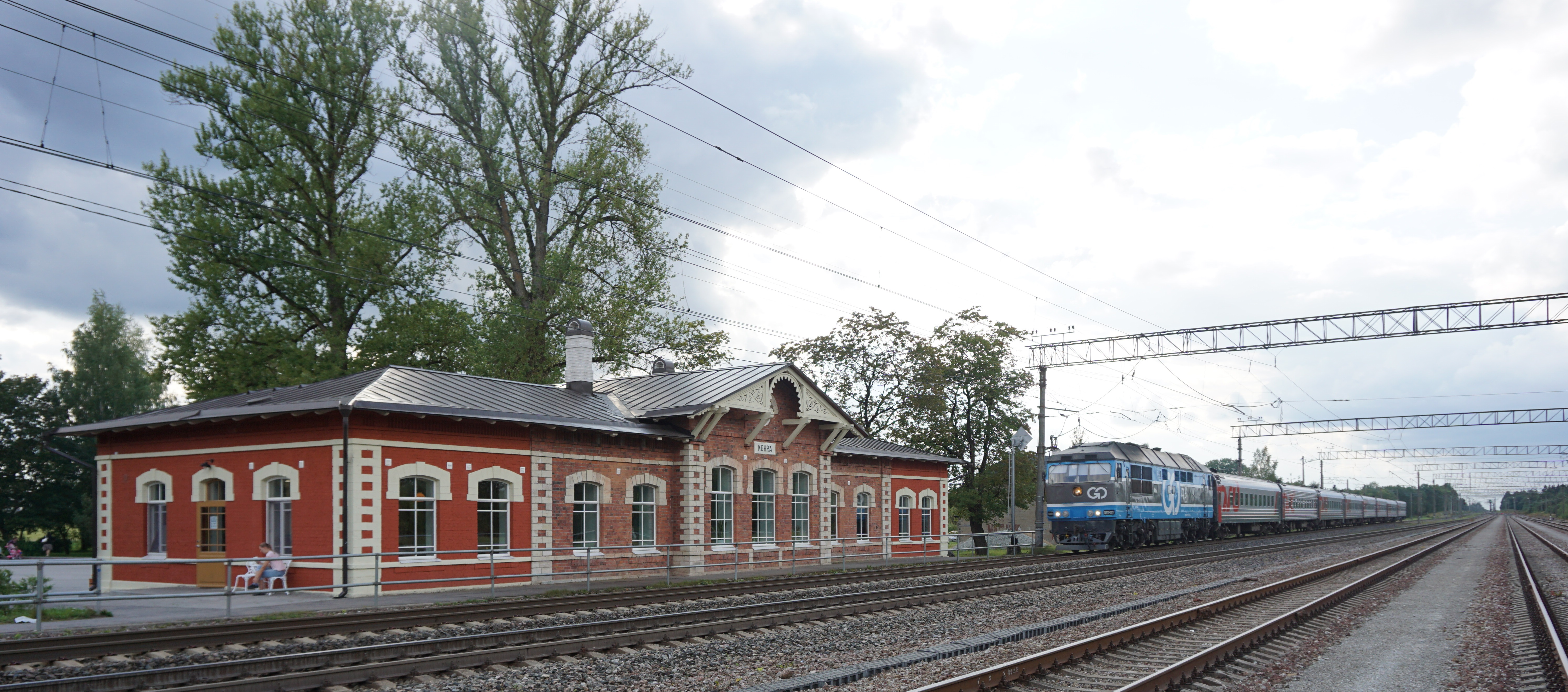 Moskva rong läbisõidul kehra jaamast